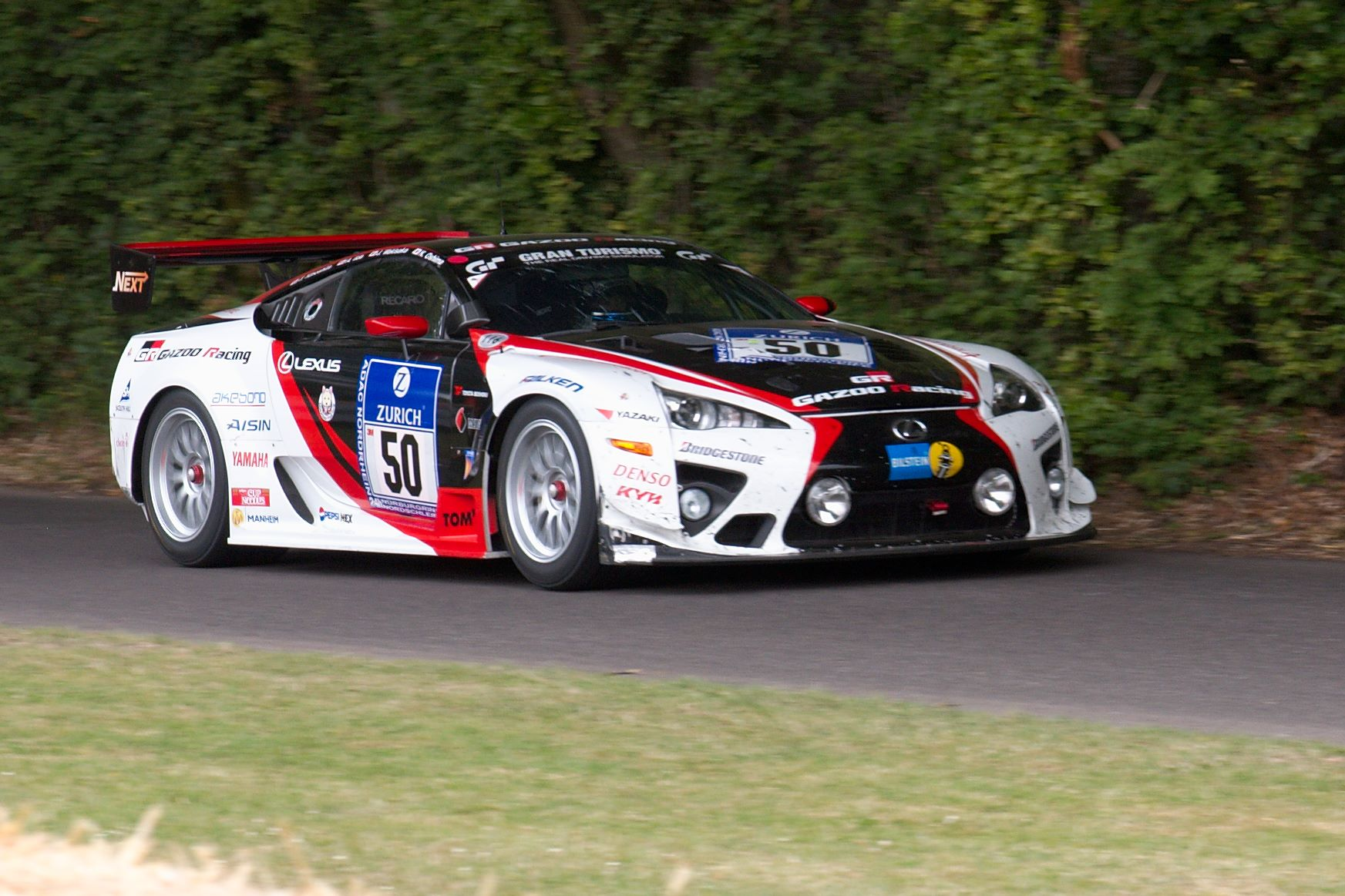 Lexus LF-A